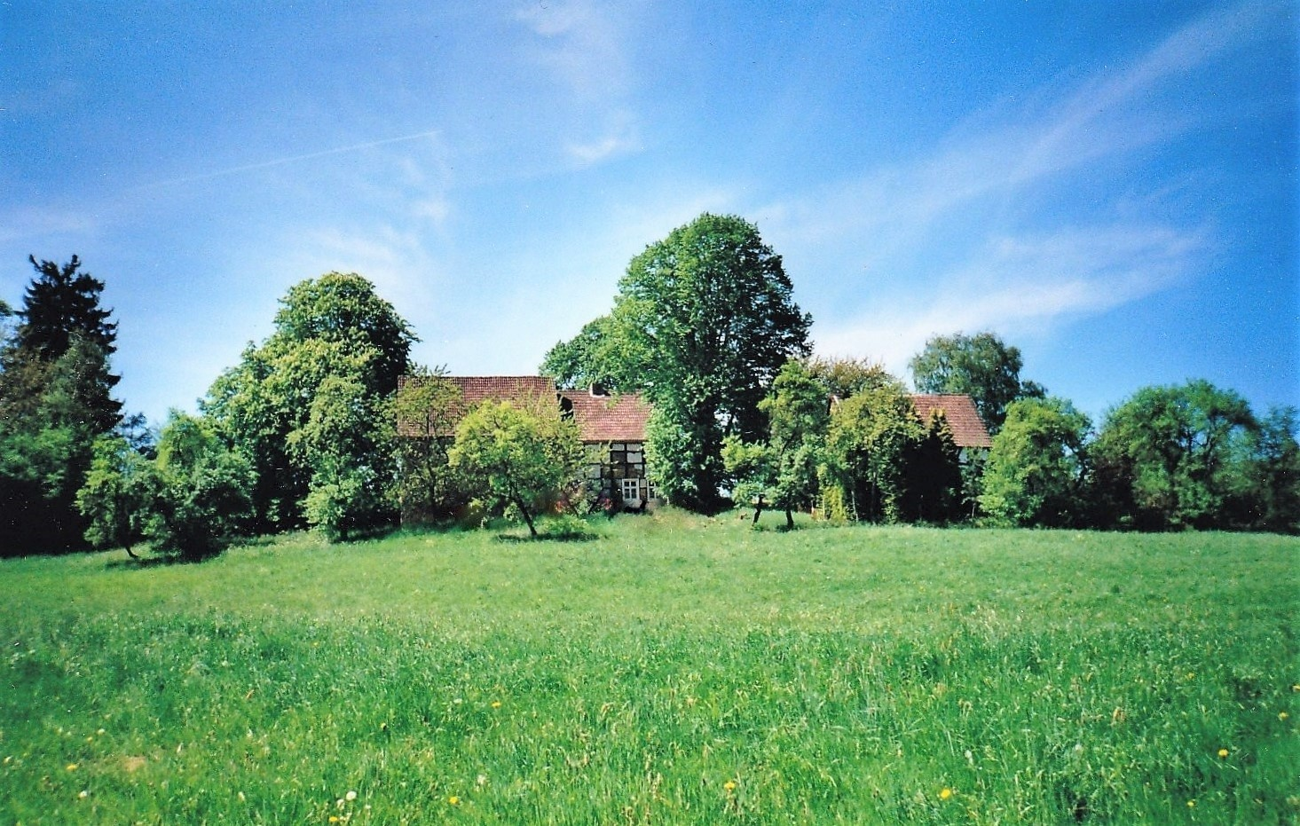 Blick auf den Hof Bärwinkel im Hattinger Stadtteil Oberelfringhausen, Felderbachstraße 103. Der Hof wurde erstmals 1220 als Lehnshof Berewinkel der Reichsabtei Werden erwähnt. Vermutlich sind die Vorfahren der Familie Bärwinkel um 1200 als Siedler aus dem Osten der sächsischen Stammesgebiete hierher eingewandert. Im Jahre 1297 wurde der Hof (Berenwinkel, mansus) vom Kloster gekauft. Im Schatzbuch der Grafschaft Mark von 1486 wird in der Bauerschaft Elffrinckhuysen ein Sroeder op den Berenwinckel mit einer Abgabe von 6 oirt (1½ Goldgulden) genannt. Älteste nachweisbare Urkunden aus dem Tauf- und Heiratsregister der evangelischen Kirchengemeinde Hattingen seit 1615. Die Hofgebäude liegen oberhalb vom Felderbach, ca. 600 m abseits der Felderbachstraße über einen Wald-/Wanderweg erreichbar. In den 1990er Jahren wurde die Landwirtschaft aufgegeben und die Flächen verpachtet.